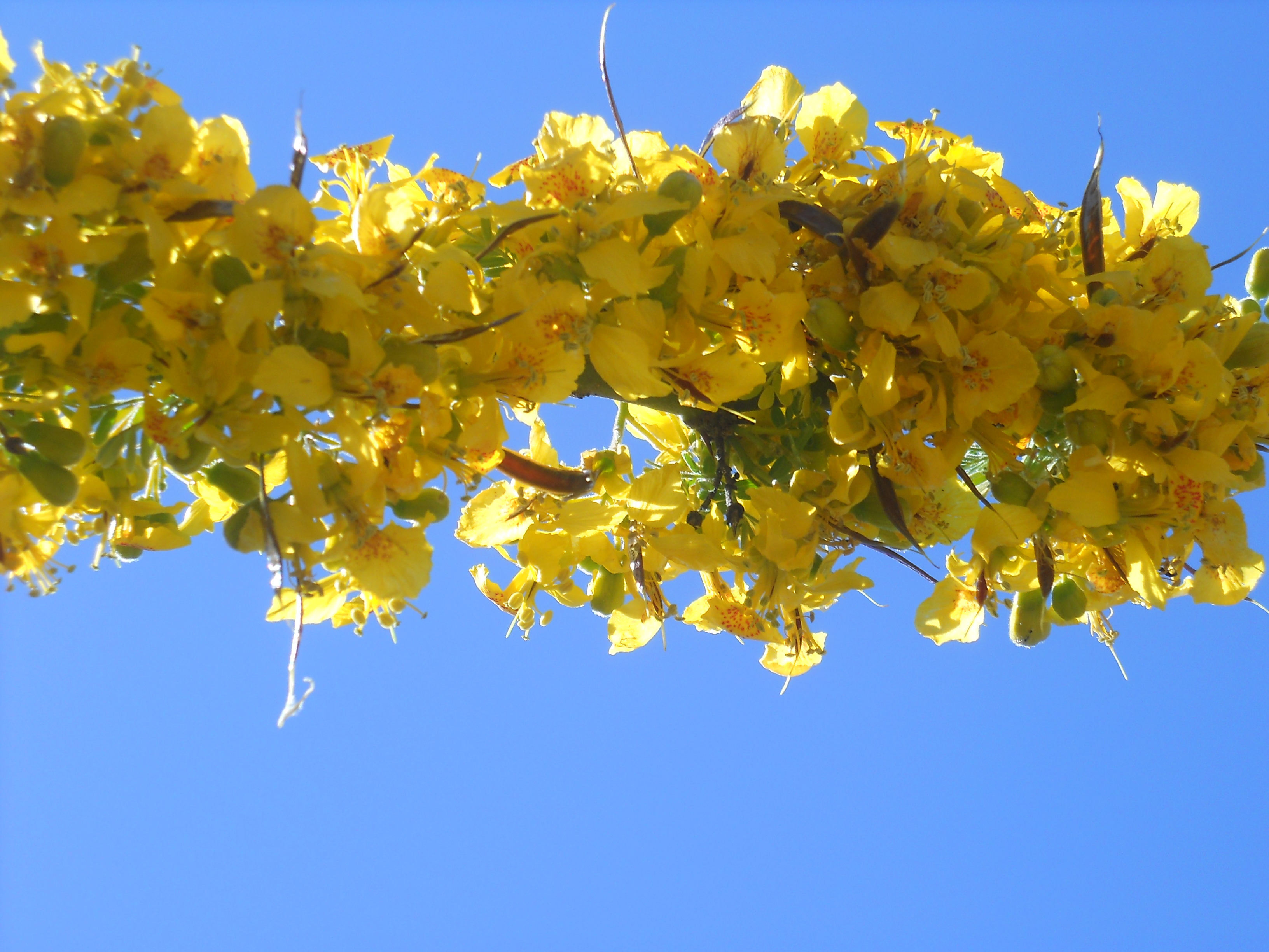 Arbol brea